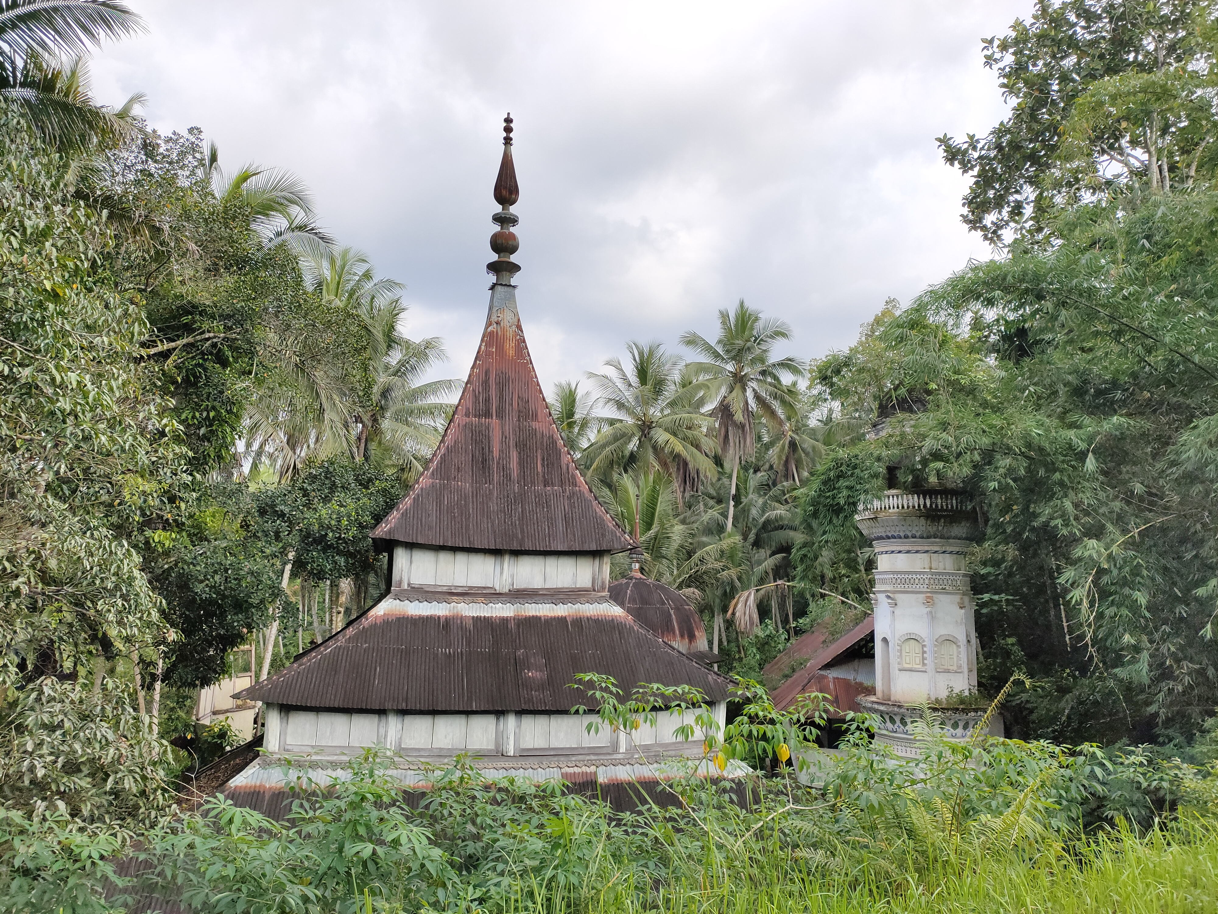 Masjid Ampang Gadang di Desa Ampang Gadang, Kecamatan Guguk, Kabupaten Lima Puluh Kota, Sumatra Barat, Indonesia.